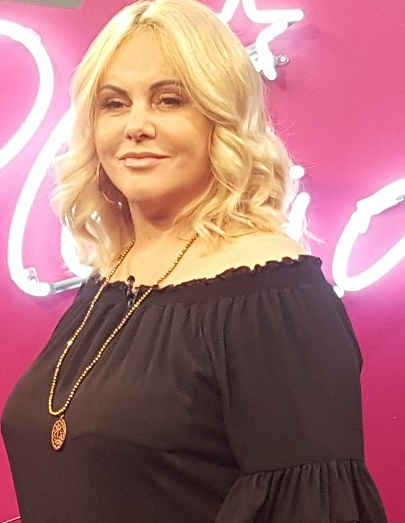 Polska aktorka Joanna Kurowska w maju 2018 roku.